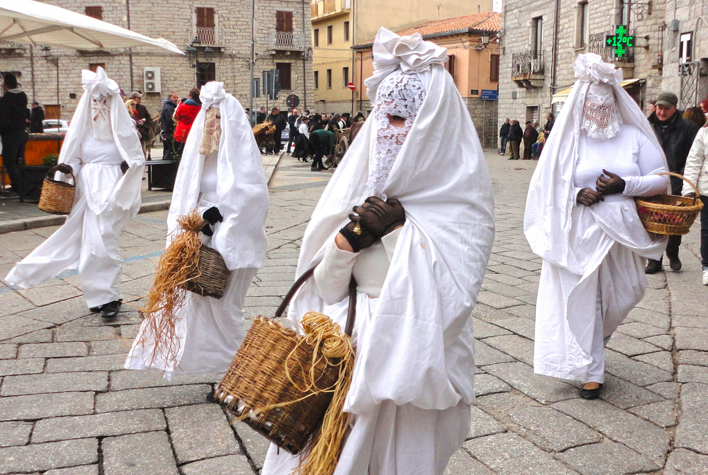 La mascara in linzolu del gruppo folk La Mascara Gadduresa di Calangianus.